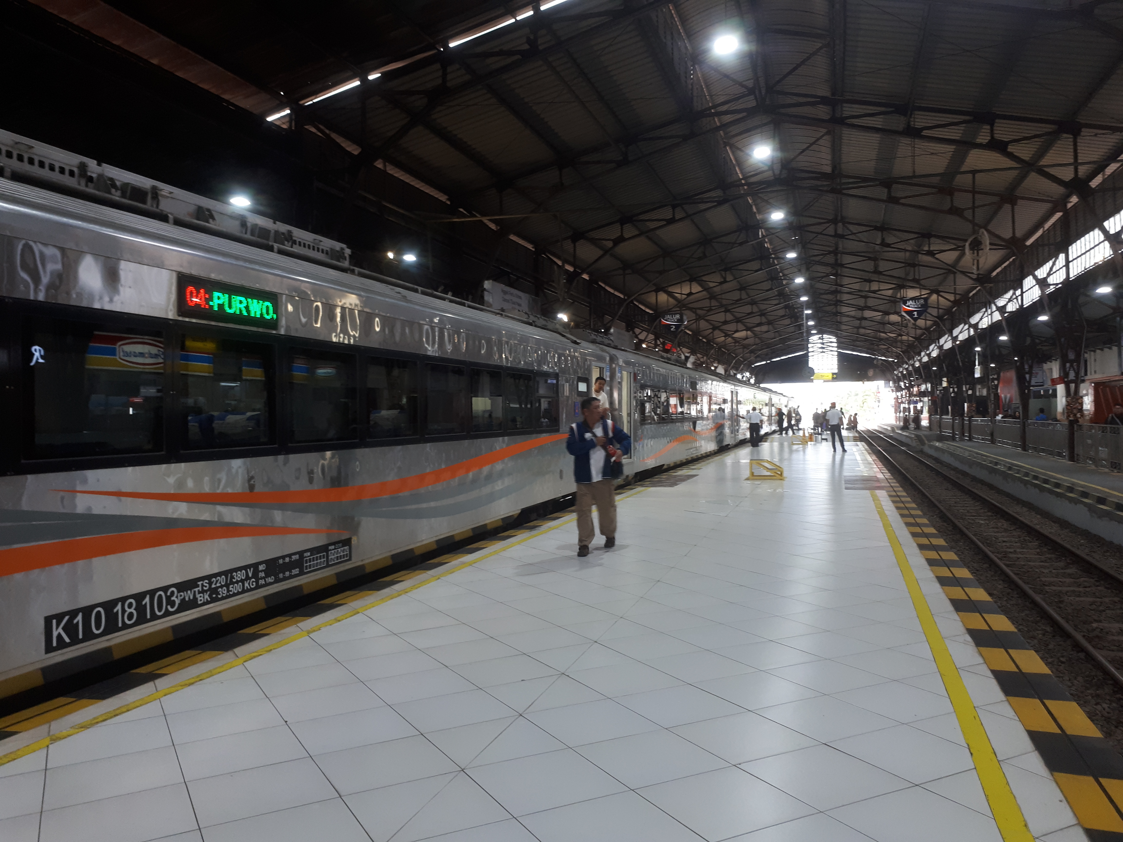 Kereta api Purwojaya saat berhenti di Stasiun Purwokerto